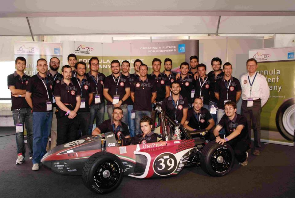 Eteam2011Hockeneim